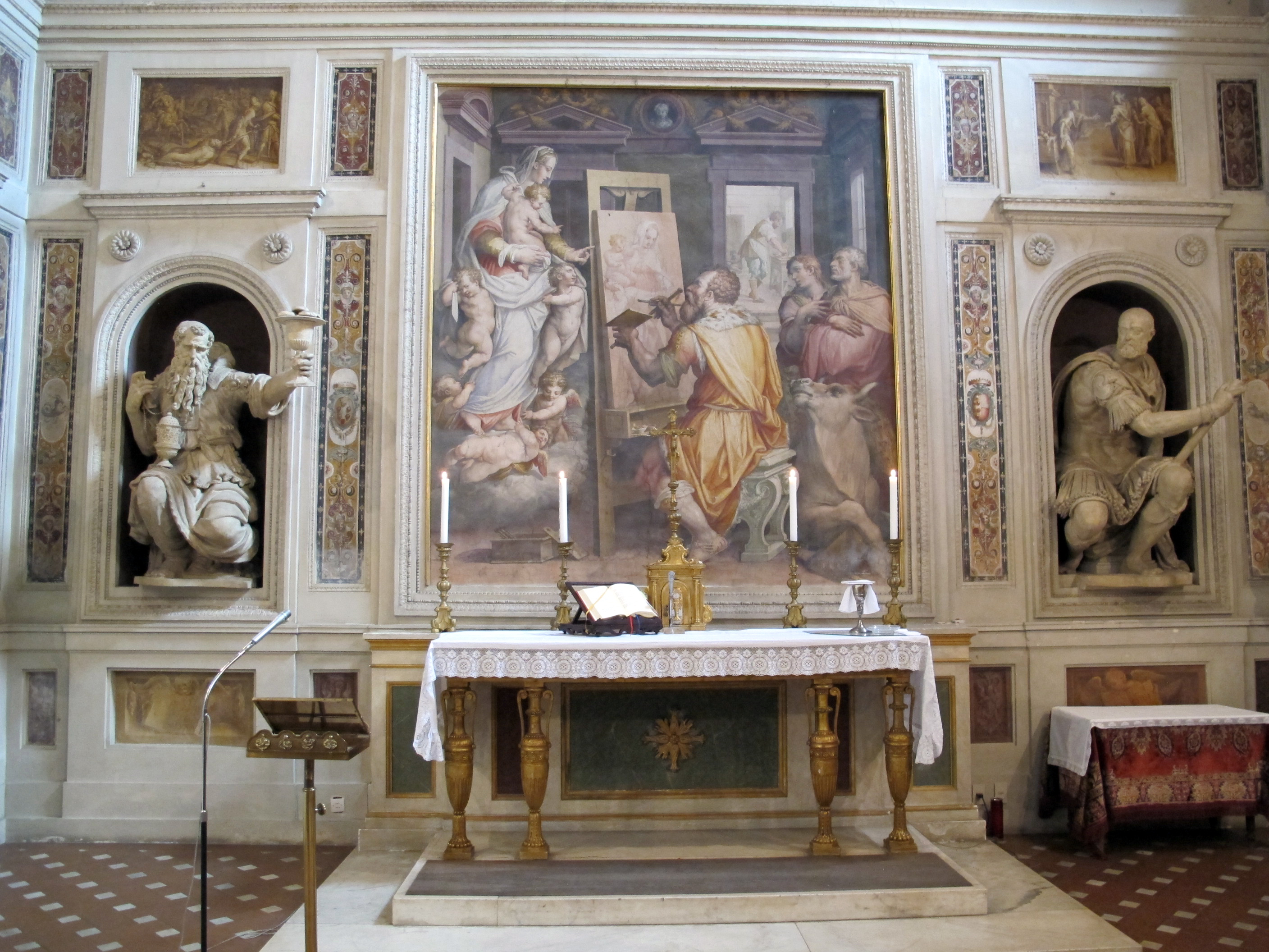 Lasta della tomba comune degli asrtisti nella Cappella di San Luca alla Santissima Annunziata, Firenze, opera del Montorsoli. Qui vennero sepolti numerosi artisti, da Pontormo al Cellini, dallo stesso Montorsoli a Andrea Sansovino. L'ultimo fu Lorenzo Bartolini nel 1848